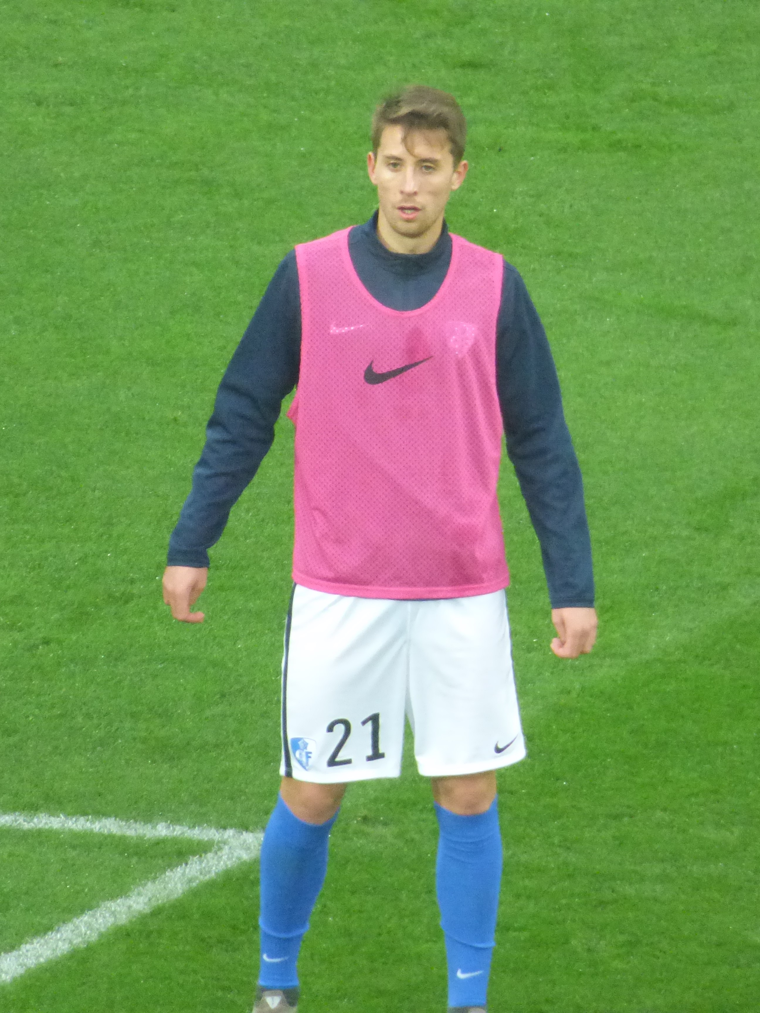 Jessy Benet avant le match RC Lens / Grenoble Foot 38, le 24 novembre 2018, comptant pour la quinzième journée du championnat de France de football de Ligue 2 2018-2019, au Stade Bollaert-Delelis.